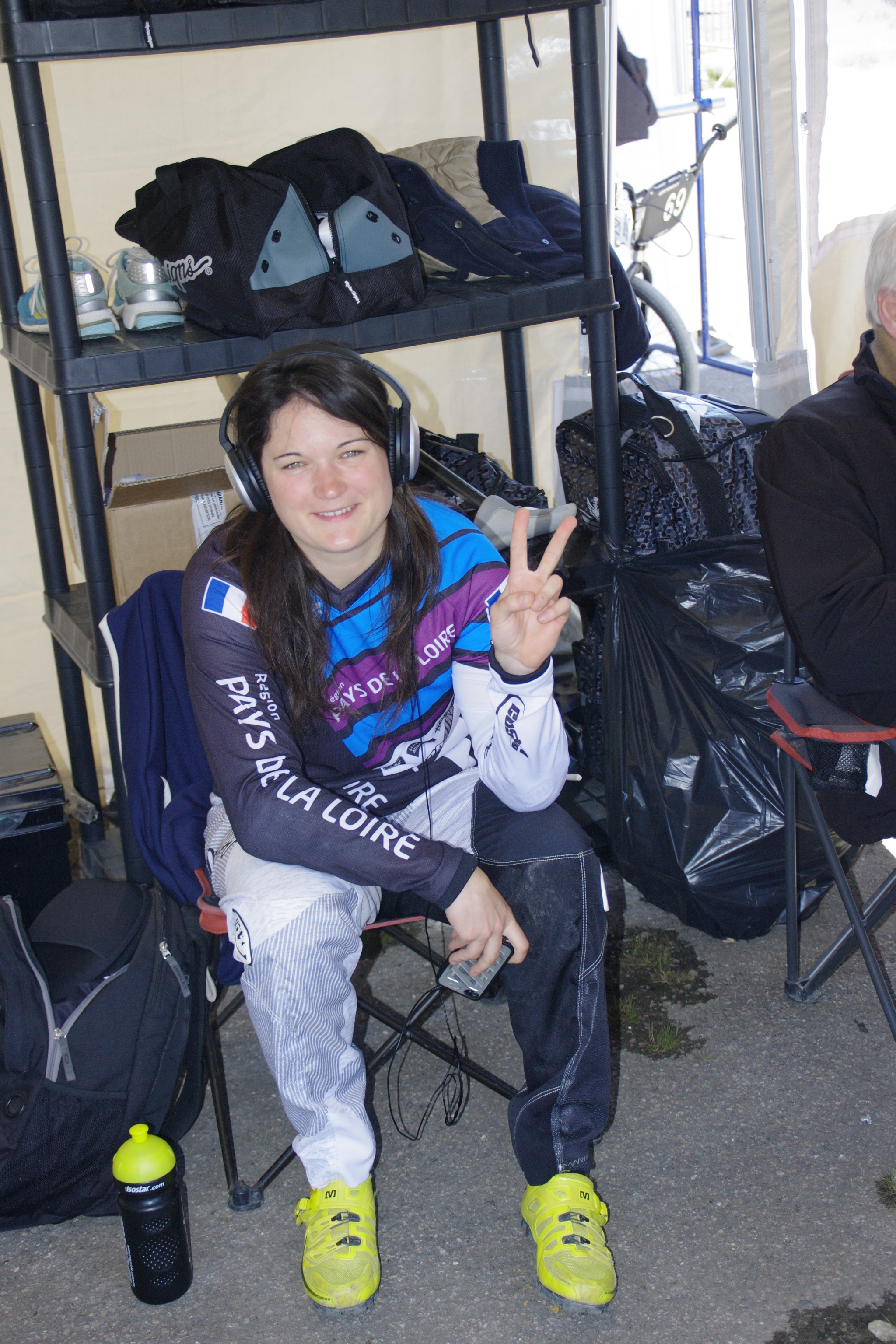 Magalie POTTIER